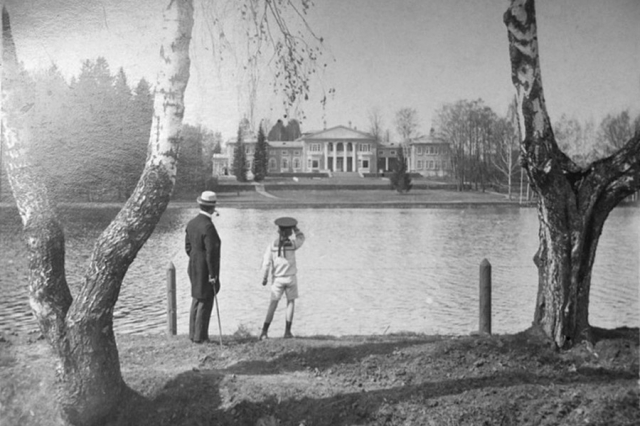 Вид с Дмитровской дороги на Долгий пруд и дом Банзы